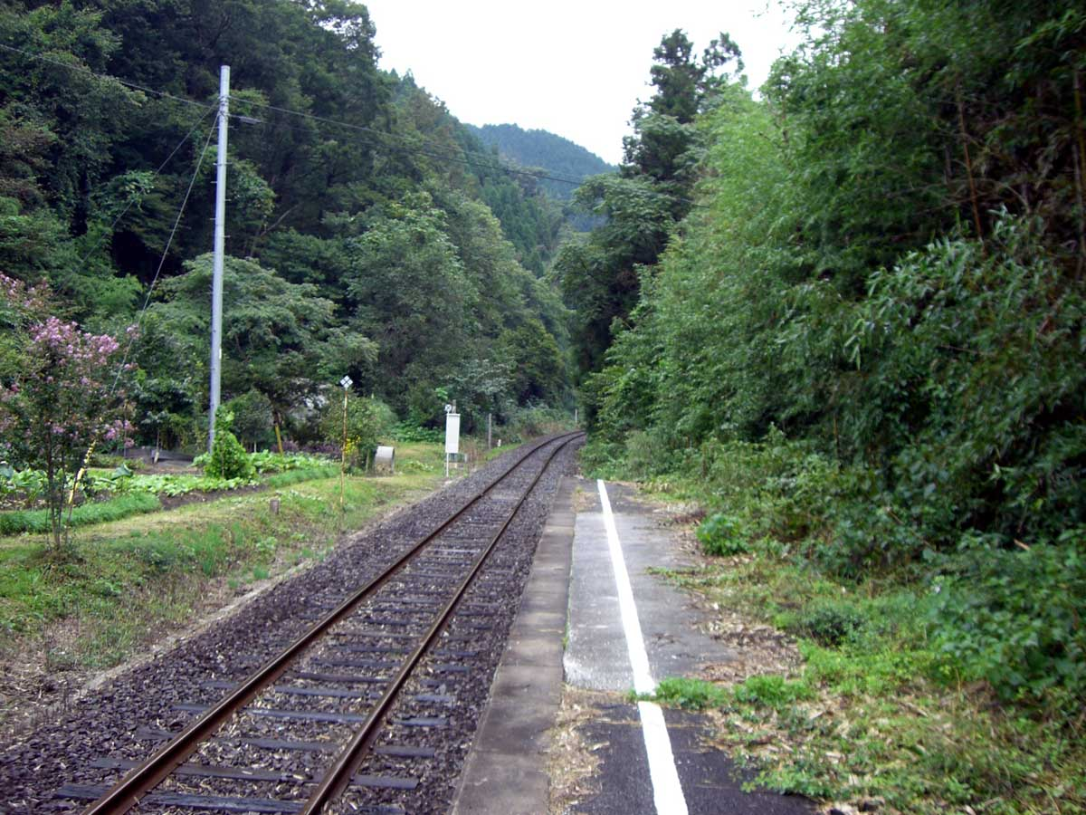 撮影地、撮影場所…JR芸備線、内名駅、備後落合方面。撮影年月日…2006年9月17日